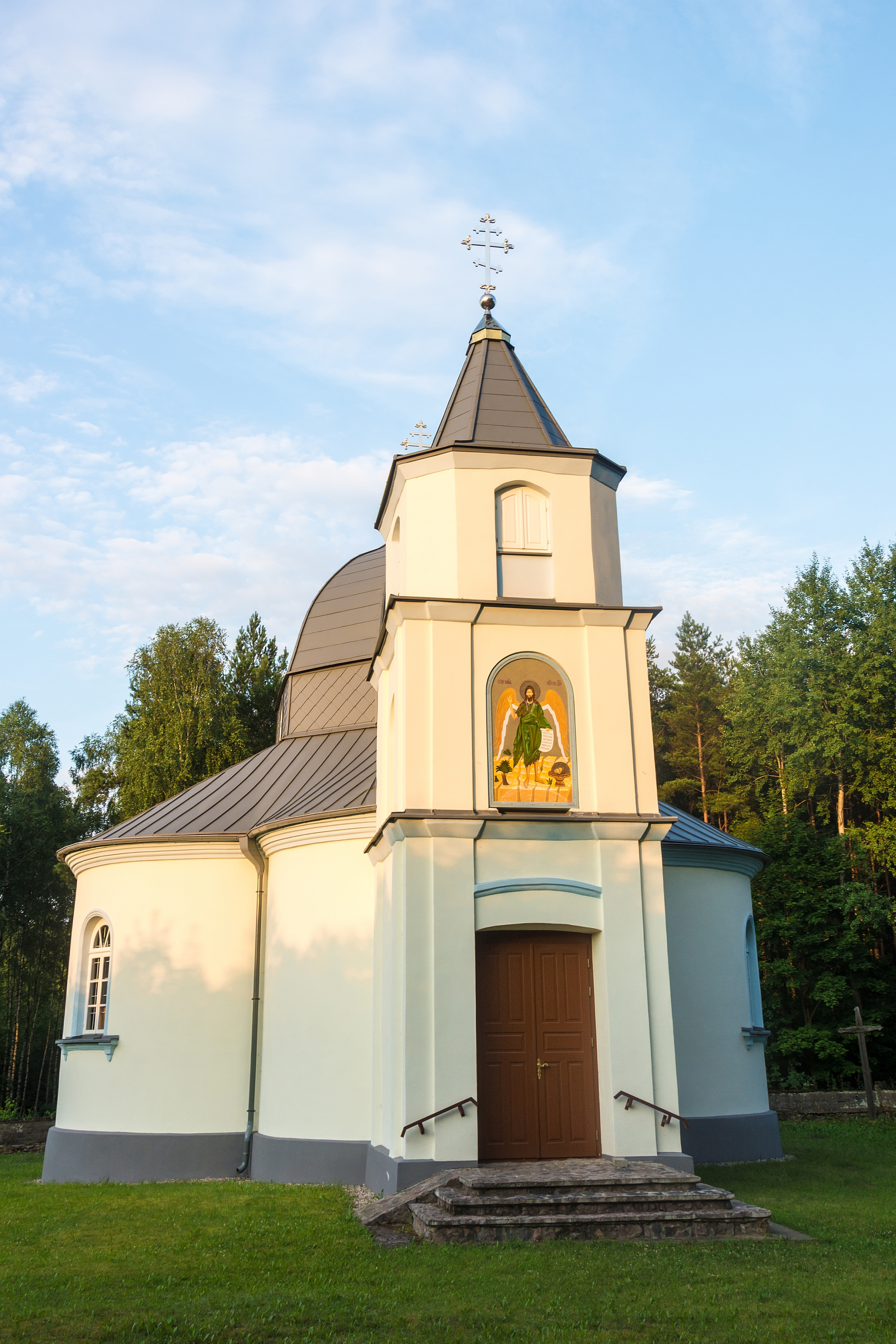 Stara Grzybowszczyzna, cerkiew prawosł. fil. pw. Narodzenia św. Jana Chrzciciela, 1930